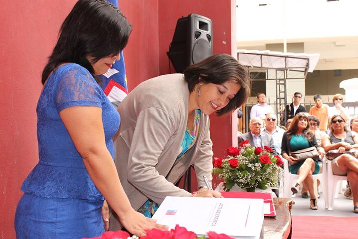 Con la presencia de las más altas autoridades regionales, encabezadas por el intendente Emilio Rodríguez Ponce, asumió su cargo la nueva gobernadora de la Provincia de Arica Andrea Murillo Neumann. En la oportunidad se leyó el respectivo decreto de designación. El acto solemne se efectuó en el patio central de la Gobernación Provincial, a él asistieron dirigentes sociales y políticos de Arica, entre los cuales se encontraba el diputado Luis Rocafull López. En su discurso de asunción la primera autoridad provincial dijo que “hoy estamos viviendo un momento histórico en el que fundaremos las bases de un nuevo Chile, más justo, más solidario y equitativo, es por esto que nuestra Presidenta Michelle Bachelet nos convocó a un trabajo en equipo, nos denominamos Nueva Mayoría, somos muchos, somos todos…Chile de todos”. Murillo agregó: “Un Chile de todos es un país con una educación gratuita y de calidad en todos los niveles, como un derecho social garantizado y con un sistema político que pueda responder efectivamente a las demandas de la ciudadanía. Esto es un gran desafío para trabajar en forma intensa y crear nuevas oportunidades para las familias de la provincia, siguiendo los lineamientos del Gobierno de la Presidenta Michelle Bachelet”. Para finalizar, la nueva gobernadora expresó que su gestión se caracterizará por un “trabajo en terreno y con la gente”. (